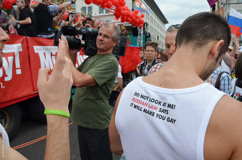 Berliner CSD 2012